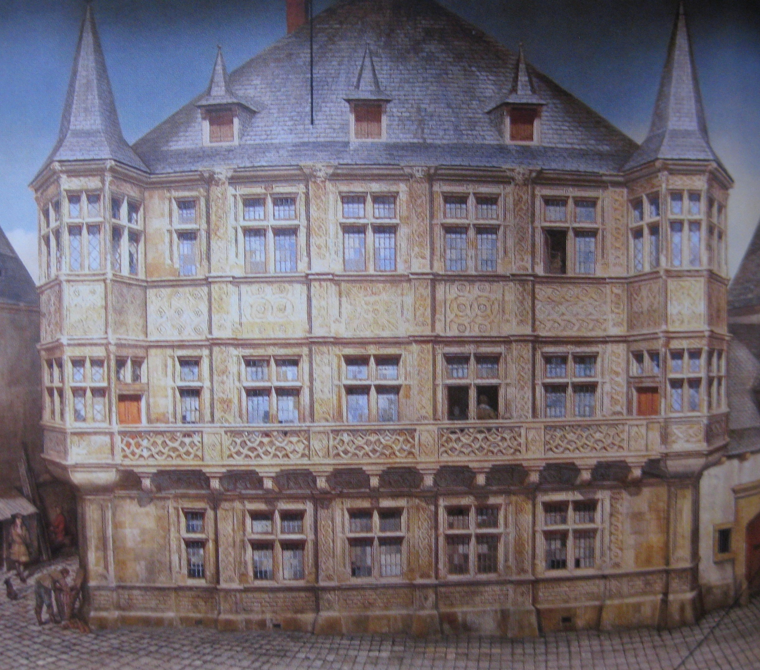 Altes Rathaus in Luxemburg Stadt am Krautmarkt um 1655 (heute Palais Grand-ducal)